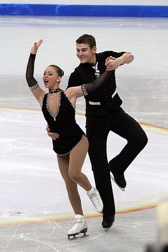 Хэвен Денни и Брендон Фрейзер (США) на чемпионате мира по фигурному катанию среди юниоров 2012